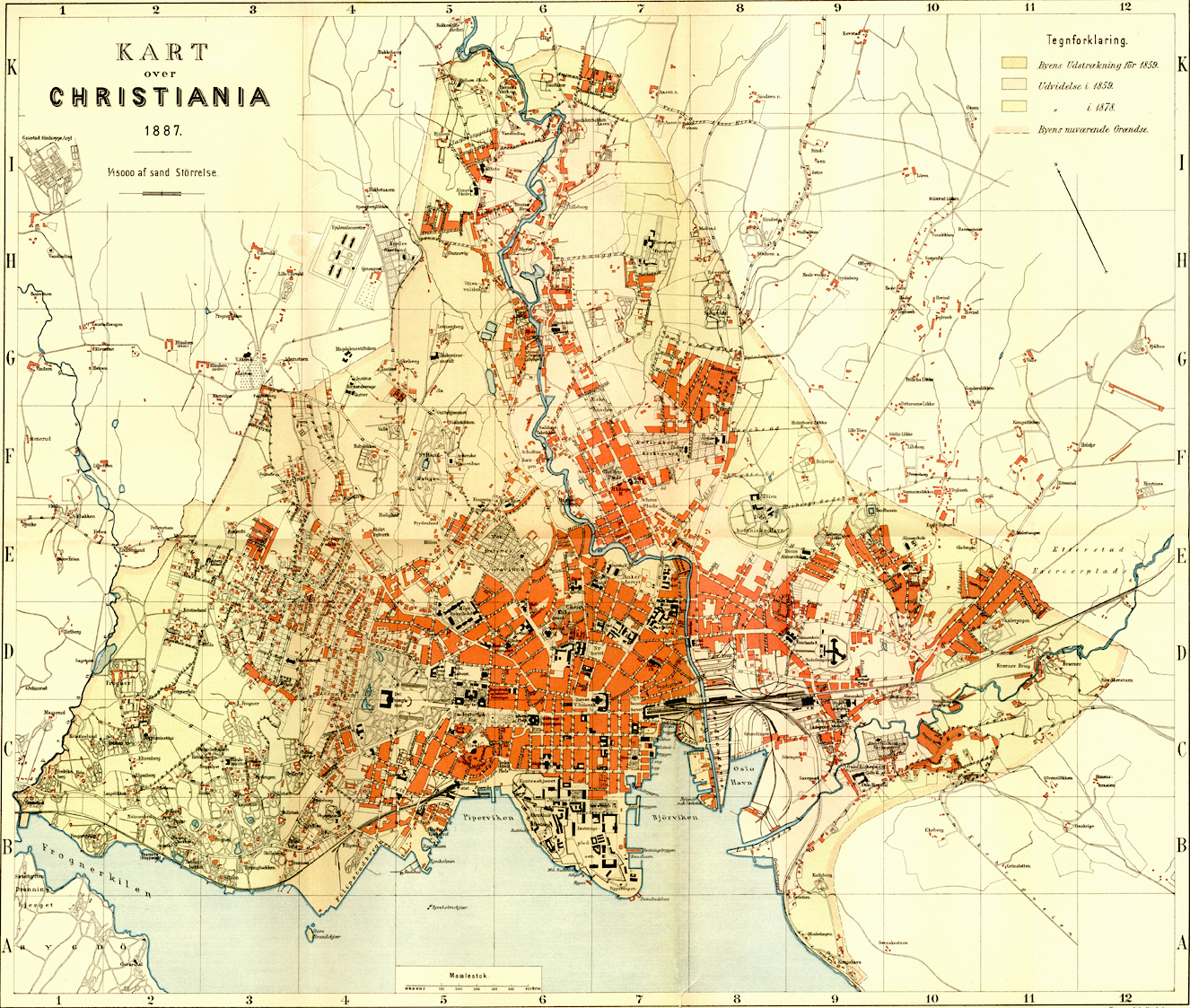 Kart over Kristiania (Oslo), 1887